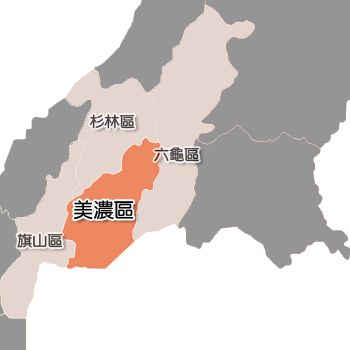 美濃區相對位置